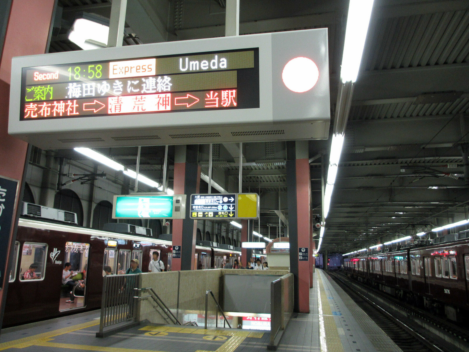 Hankyu Takarazuka Station platform